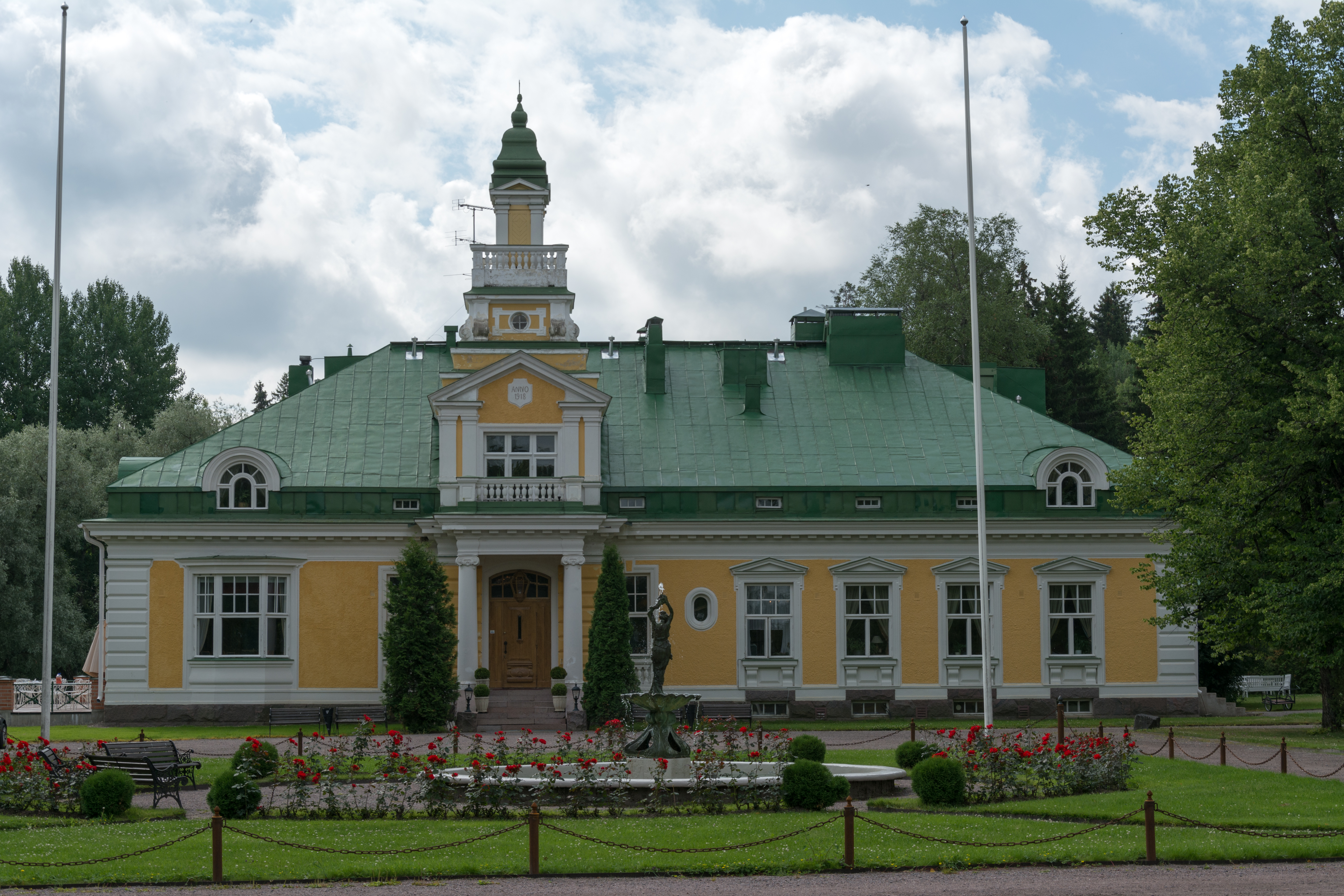 Hirvíhaaran kartano Mäntsälässä